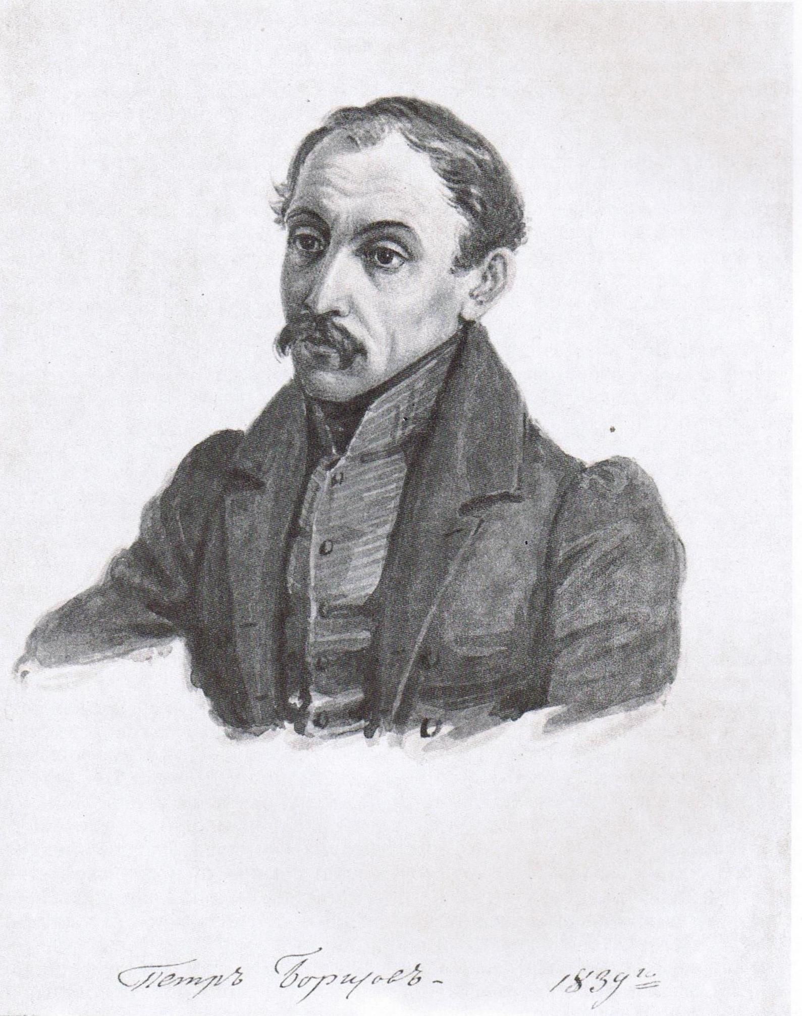 Пётр Иванович Борисов